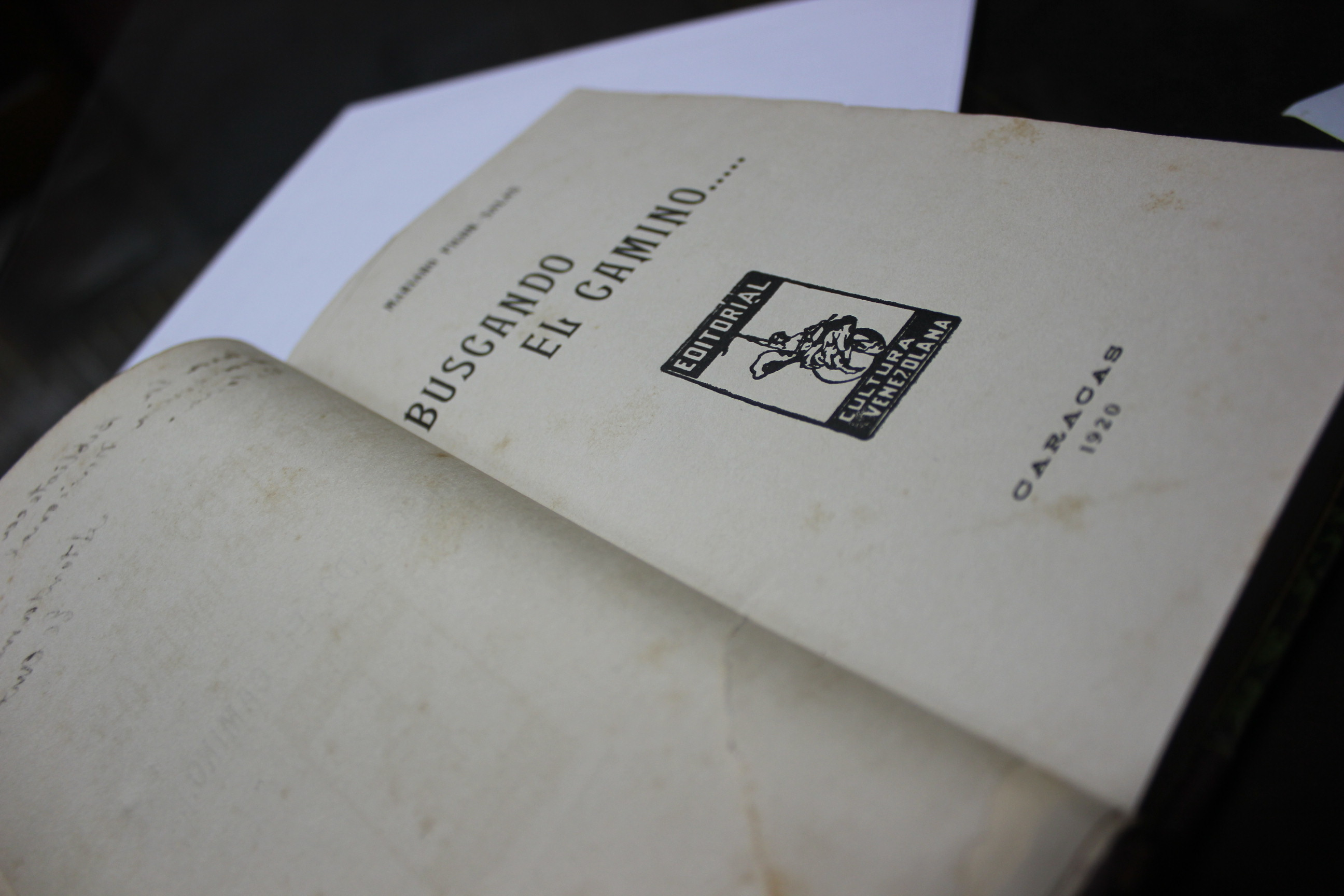 Buscando el camino, libro de Mariano Picón Salas publicado en 1920.